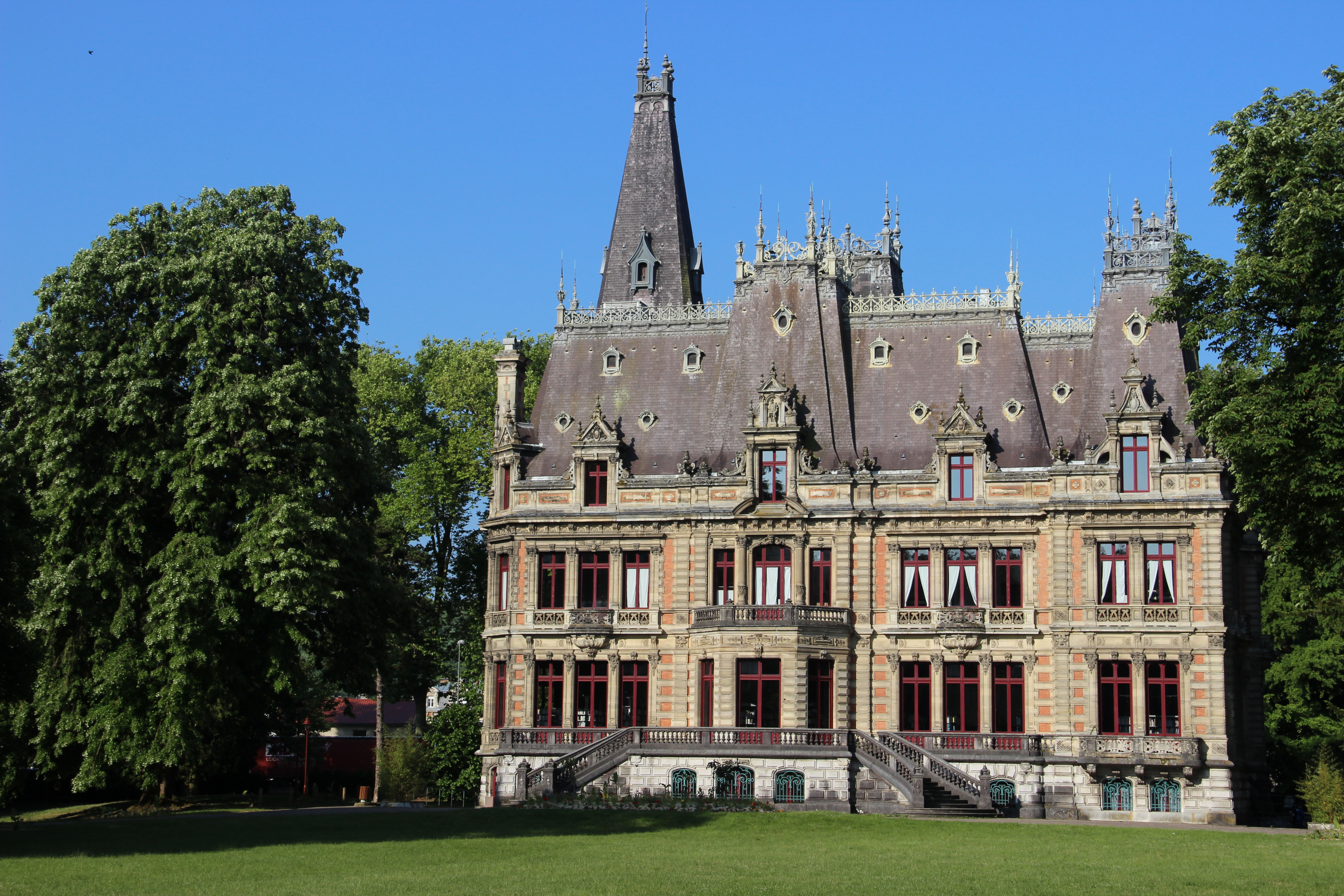 Le château de Marbeaumont